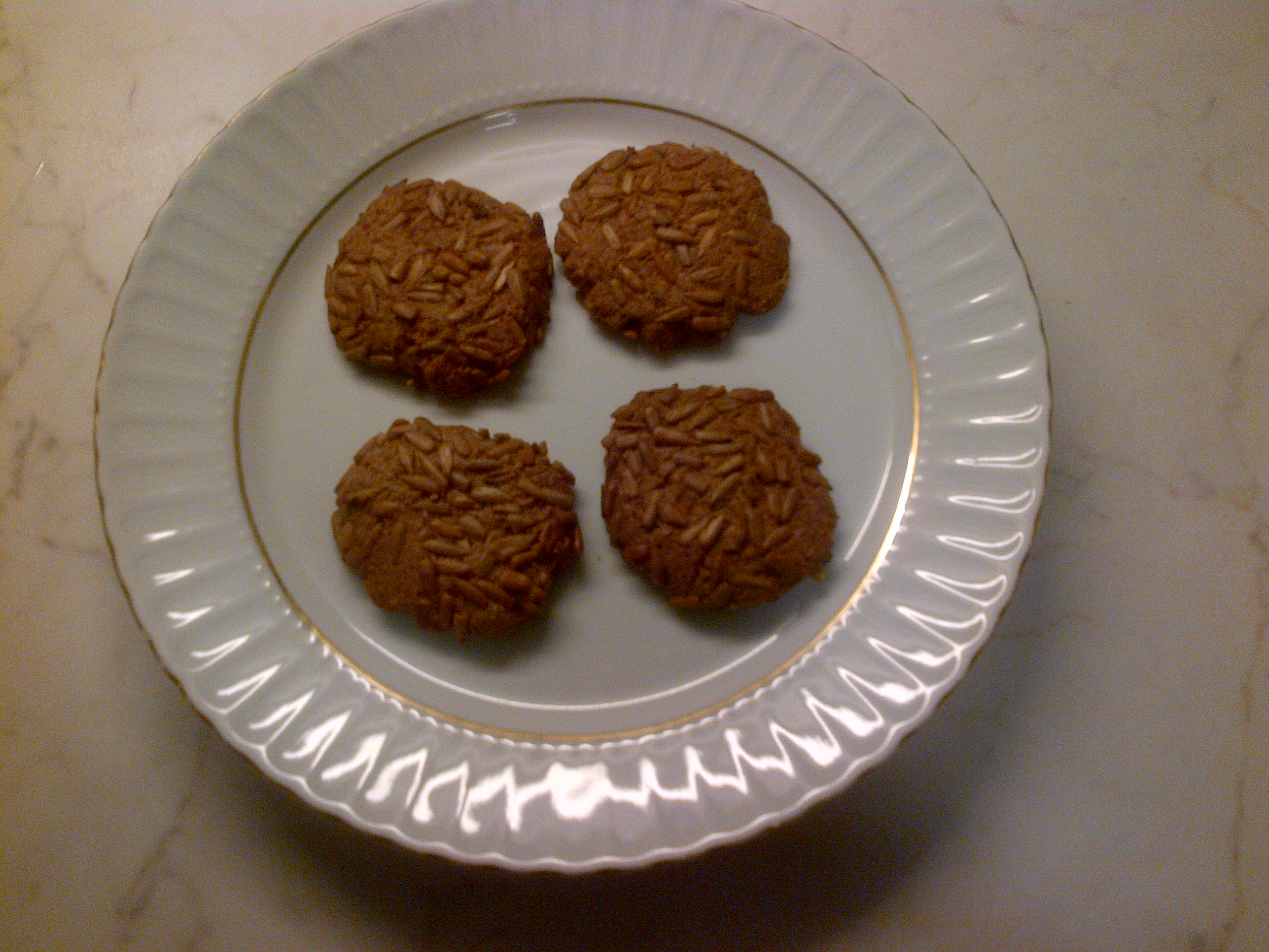 Unos "kurabiye" con semillas de girasol de la famosa panaderia de Kireçburnu en el Bosforo, Estambul.